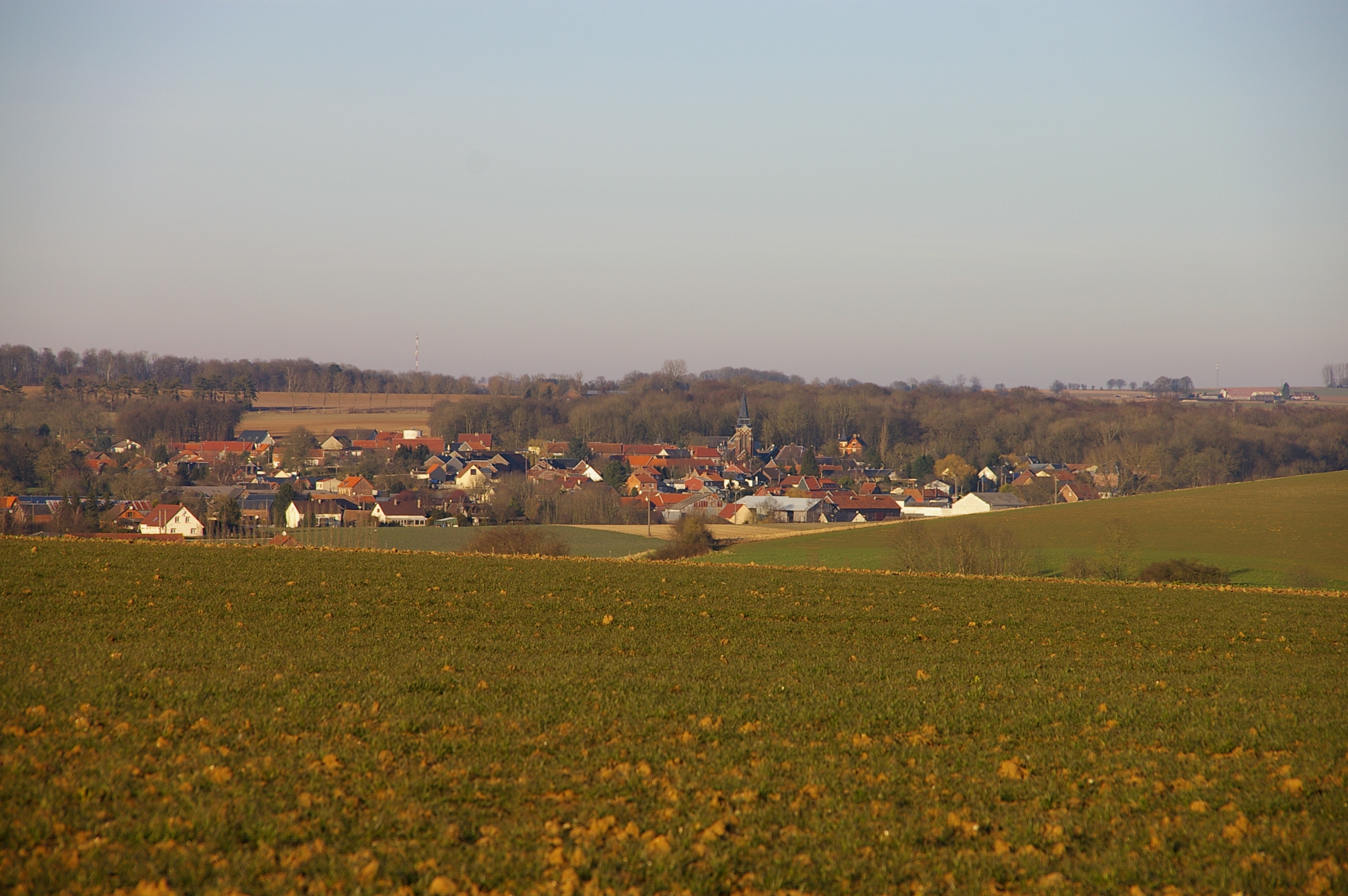 Vue générale de Fricourt (Somme) depuis le chemin de la Boisselle